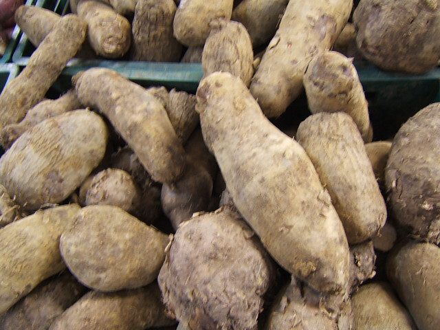 Nhames à venda em um spermercado